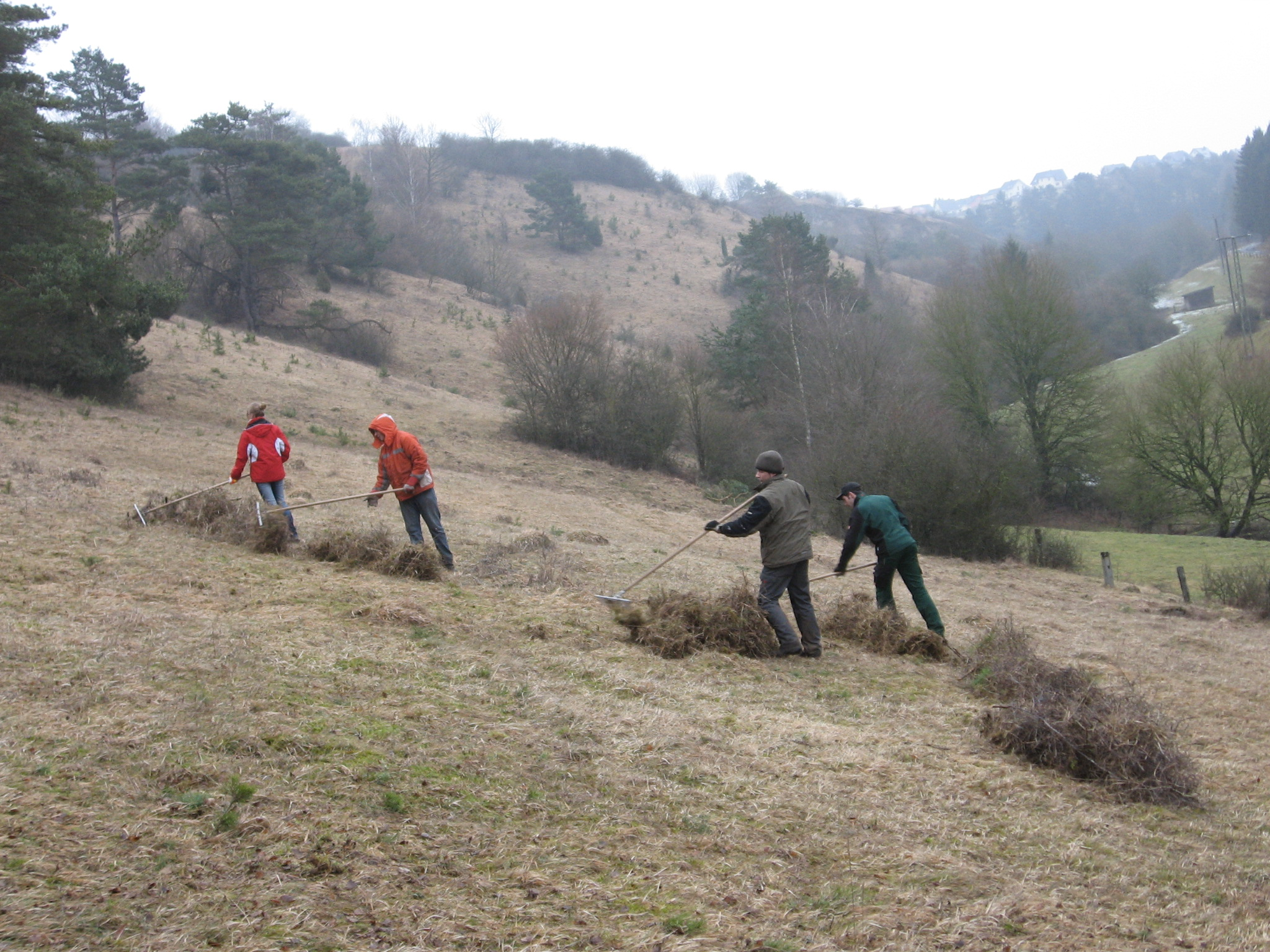 Abharken von mit dem Freischneider abgemähten Stockausschlagen, Altgras und Kiefern im östlichen Teil des Naturschutzgebietes Wulsenberg bei Marsberg, NRW, Deutschland. Im Hintergrund ist das Dorf Erlinghausen zu sehen.